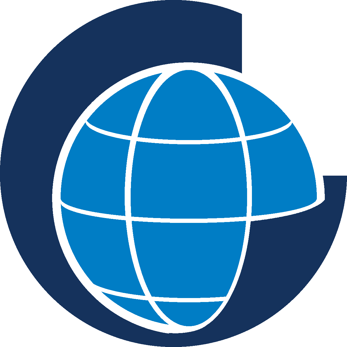 Logo Badan Informasi Geospasial